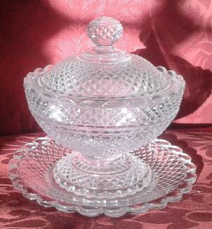 Compotera de cristal tallado de Baccarat. Francia. Circa 1880. Elaborada en tres piezas: Plato, Recipiente y tapa